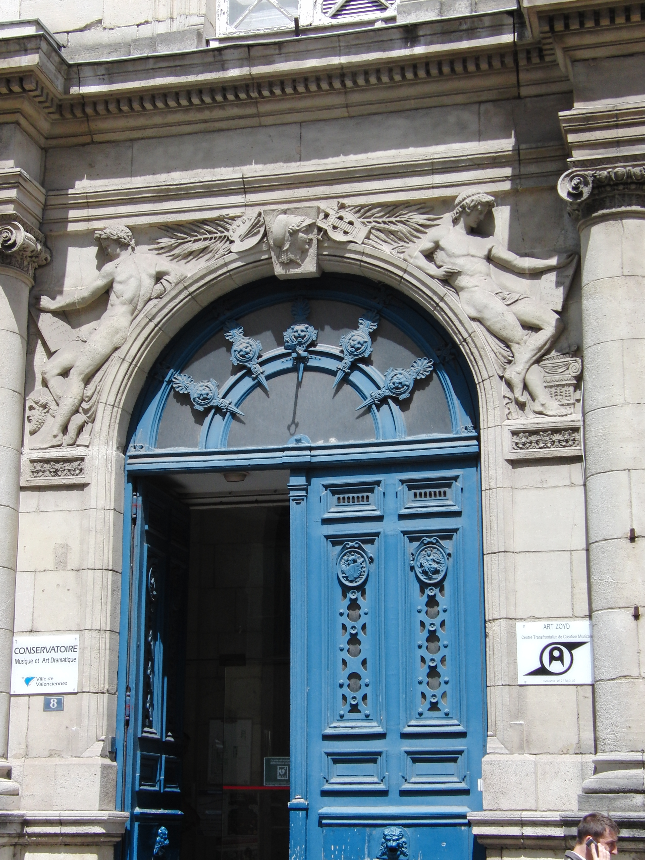 Porche du Conservatoire de Musique à Valenciennes Nord (département français). This building is en partie classé, en partie inscrit au titre des Monuments Historiques. .